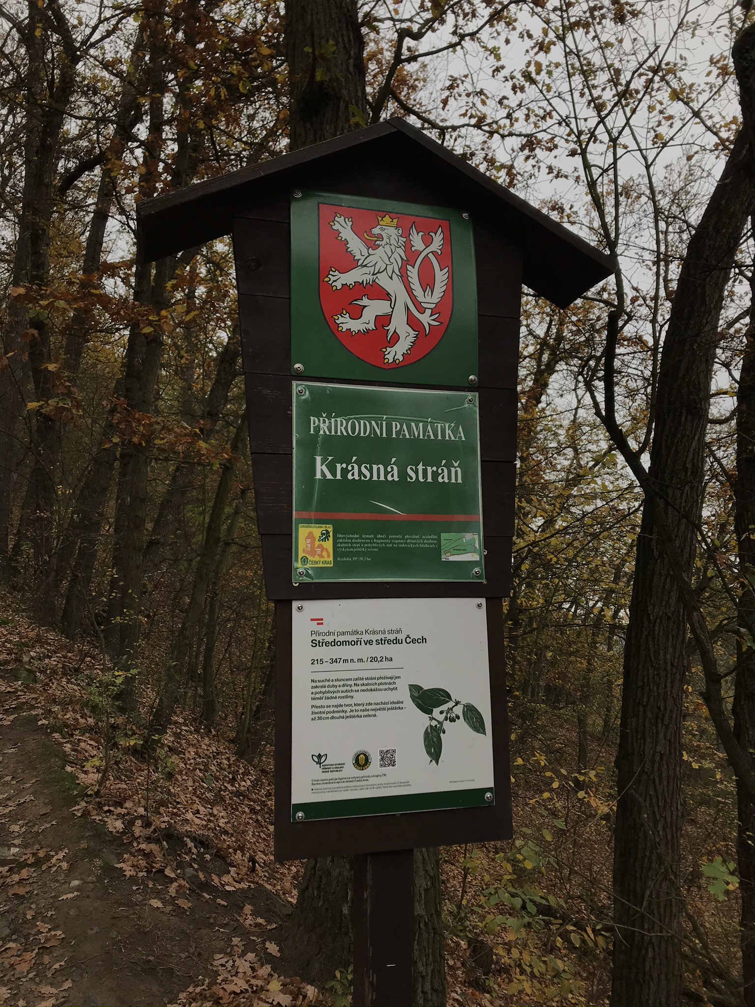 Značka PP Krásná stráň